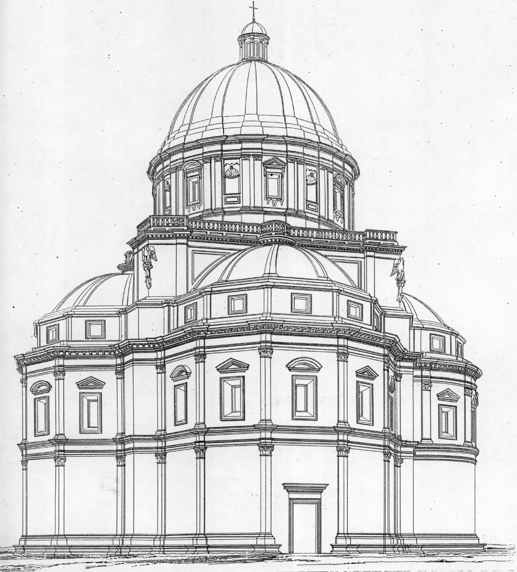 Autore: Laspeyres, Paul: Vista di Santa Maria della Consolazione, 1869. In S. Maria della Consolazione zu Todi : nebst Mitteilungen über die mittelalterlichen Baudenkmale dieser Stadt / aufgenommen und gezeichnet von Paul Laspeyres, Berlin : Ernst & Korn, 1869 . L'autore è morto nel 1882